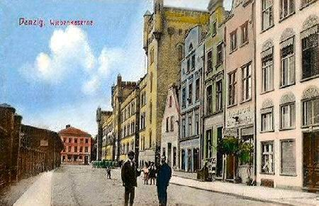 Stare Przedmieście w Gdańsku, ul. Żabi Kruk - koszary Wijbego.